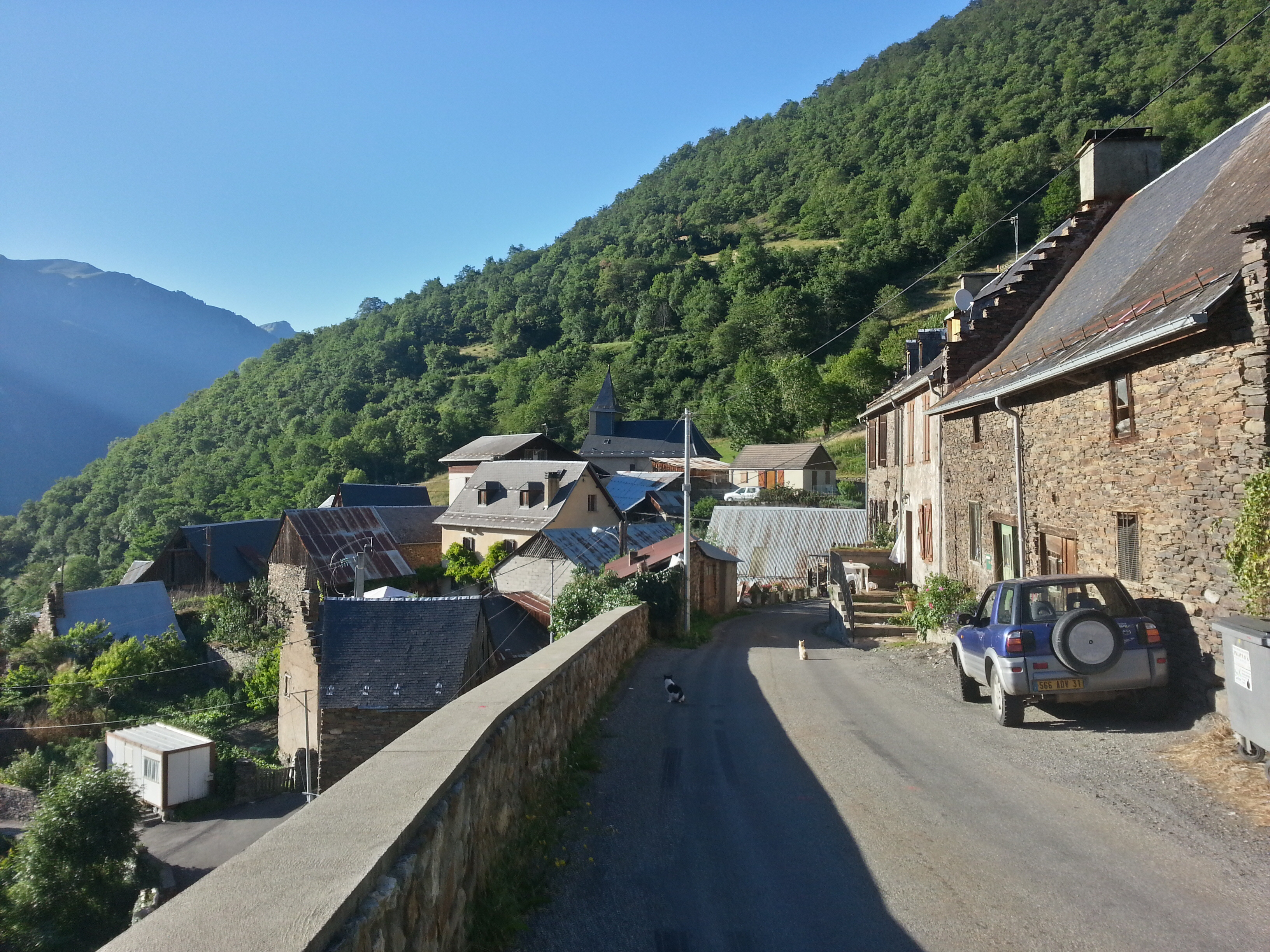 Le village de Sode